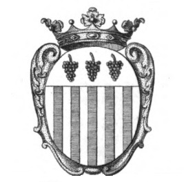 Wappen des Adelsgeschlechts der von Moro. Schild mit Schildeshaupte. Im silbernen Schildeshaupte drei neben einander gelegte, gestürzte Weintrauben und im silbernen Schilde fünf blaue Pfähle. Abbildung aus dem Wappenbuch des gesammten Adels des Königreichs Baiern, Band VII, Tafel 33 herausgegeben von K. Tyroff